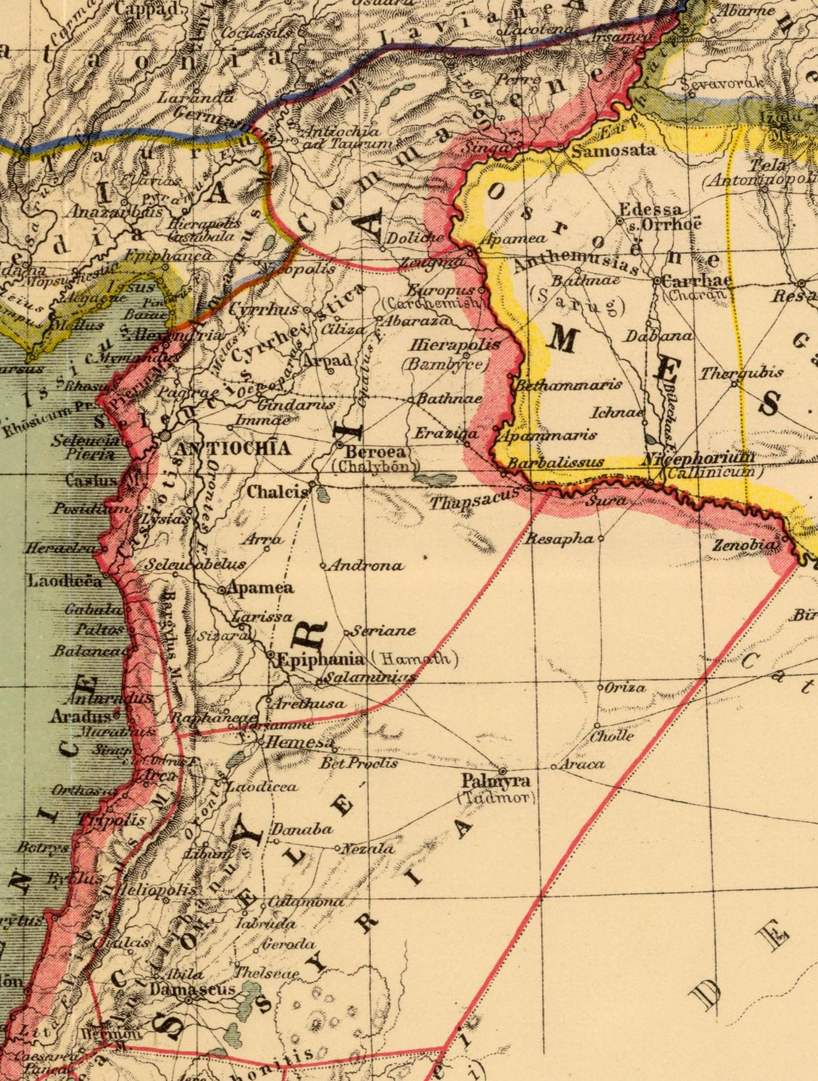 Syria. Asia citerior. Auctore Henrico Kiepert Berolinensi. Geographische Verlagshandlung Dietrich Reimer (Ernst Vohsen) Berlin, Wilhemlstr. 29. (1903)